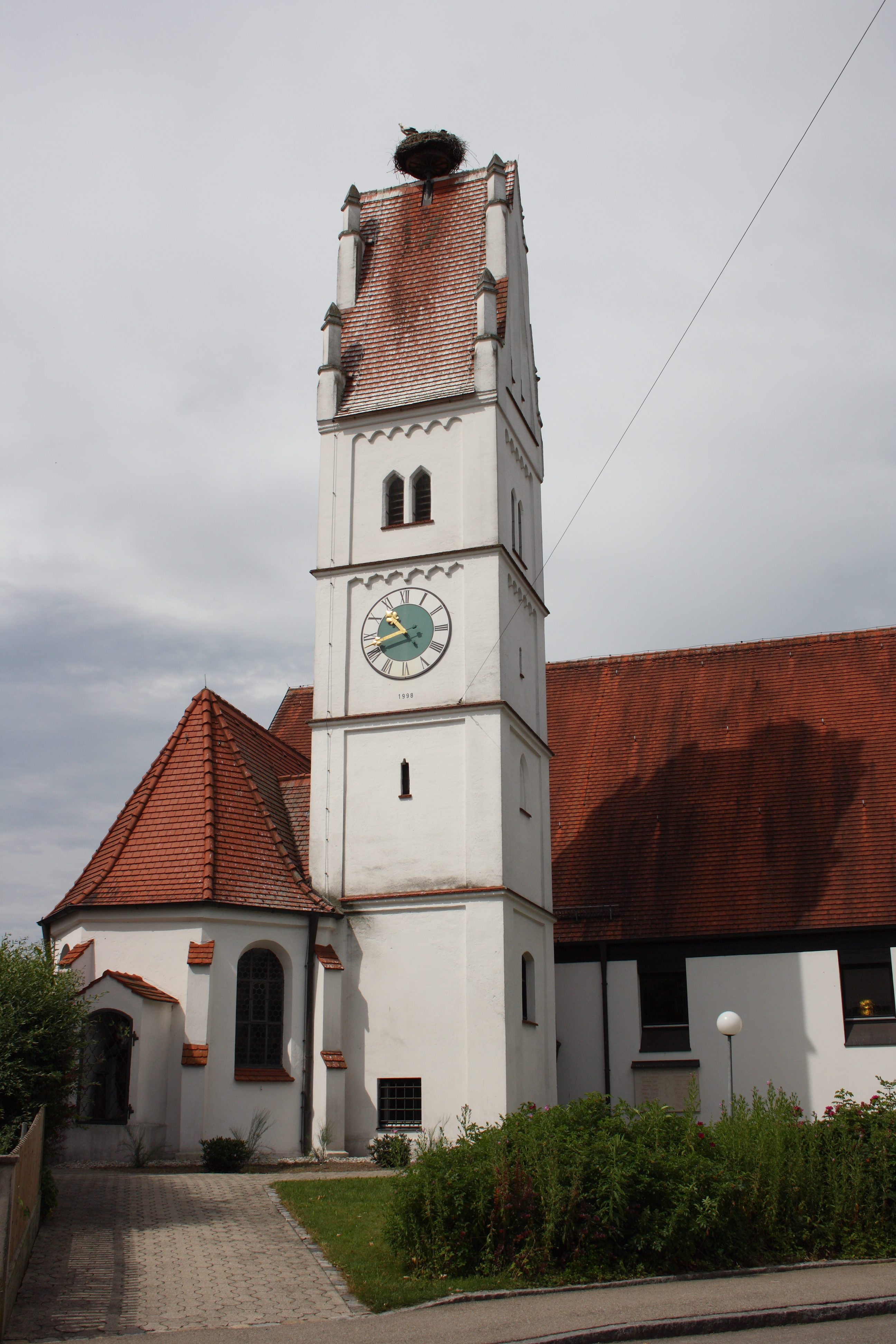 Katholische Pfarrkirche St. Nikolaus in Zusamzell, einem Ortsteil von Altenmünster im Landkreis Augsburg (Bayern), spätgotische Nebenkapelle (ehemaliger Chor) und Turm, Kirchenneubau von 1975/76